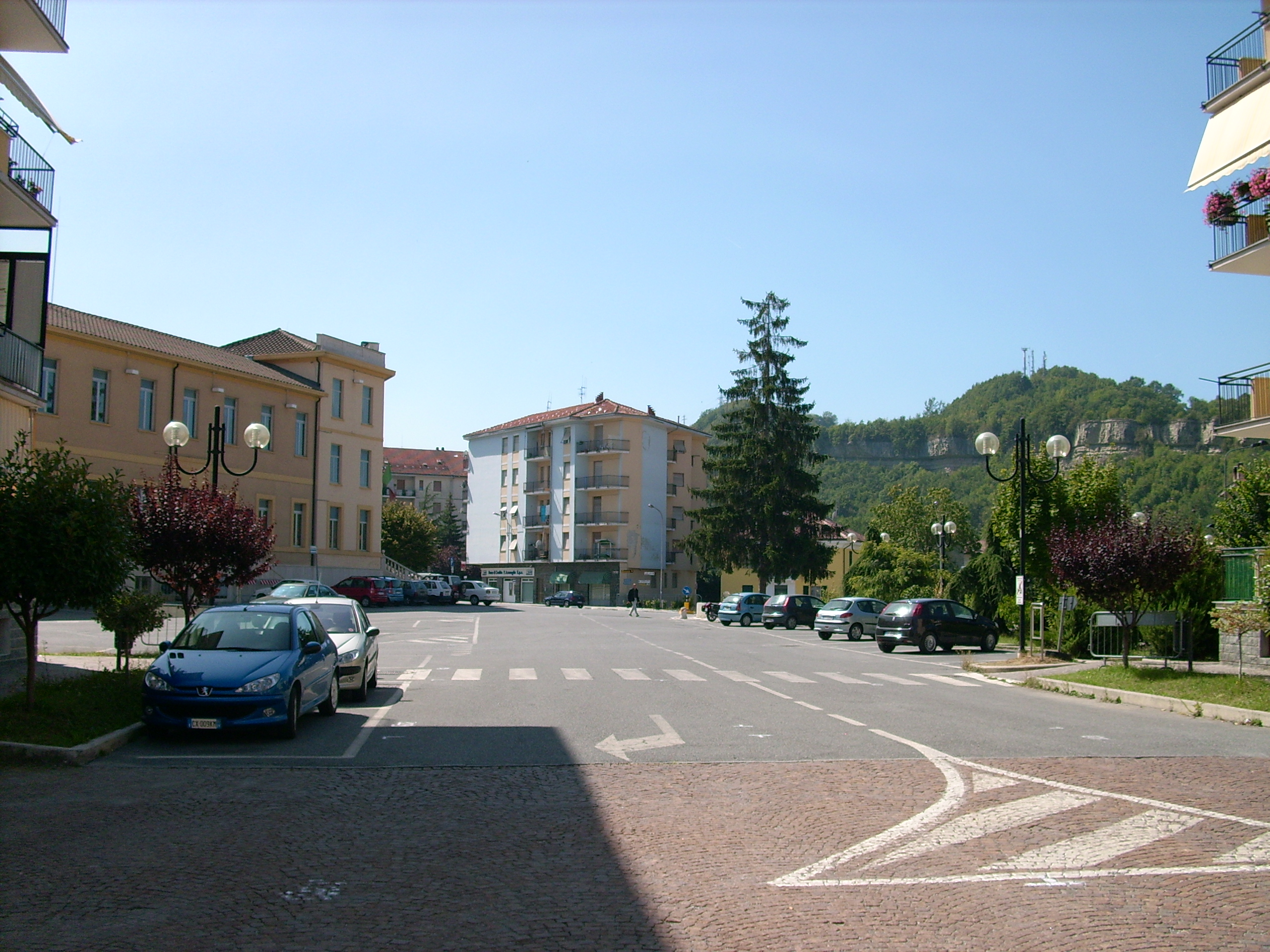 Cengio, Liguria, Italia